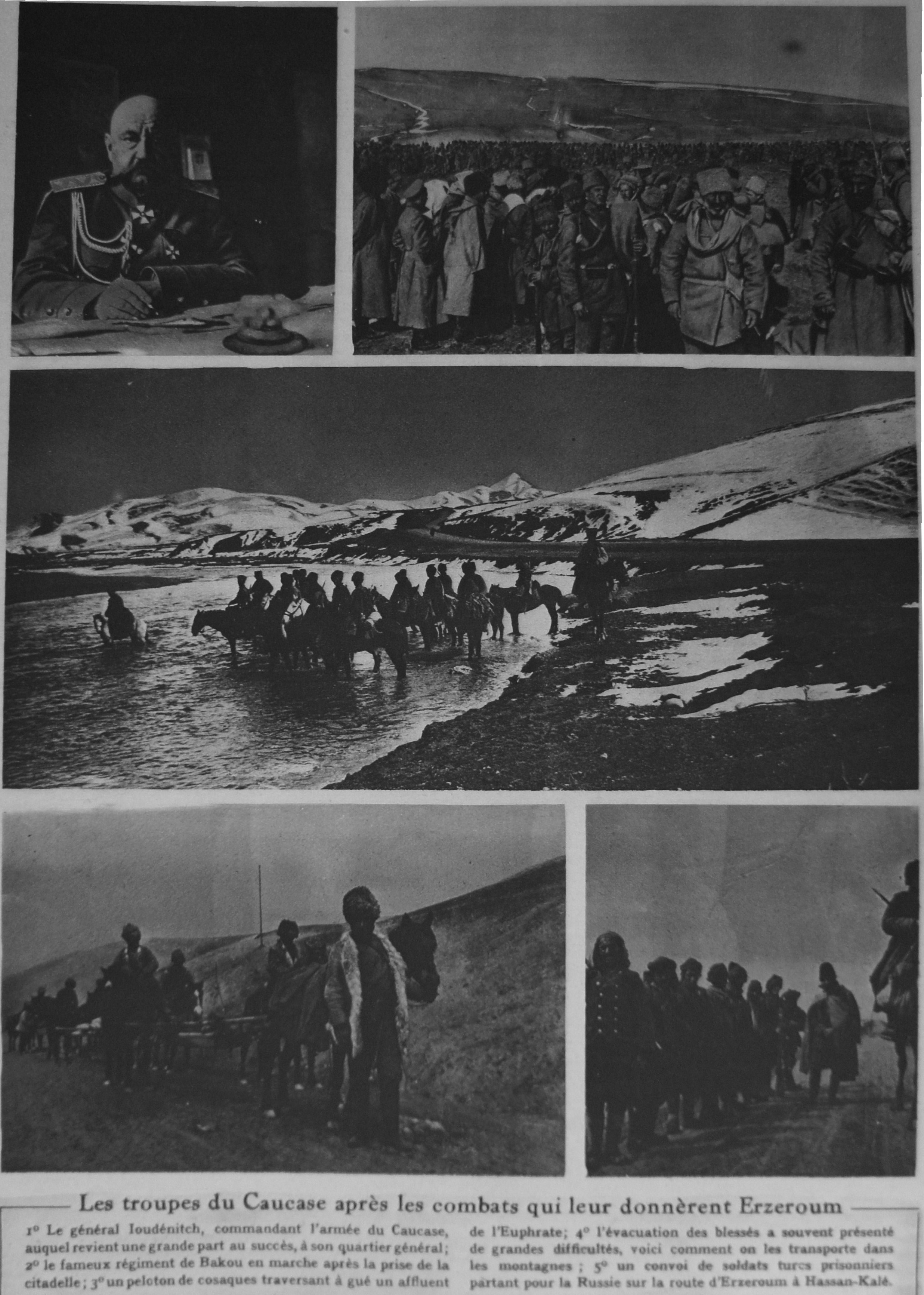 extrait du journal "le miroir".